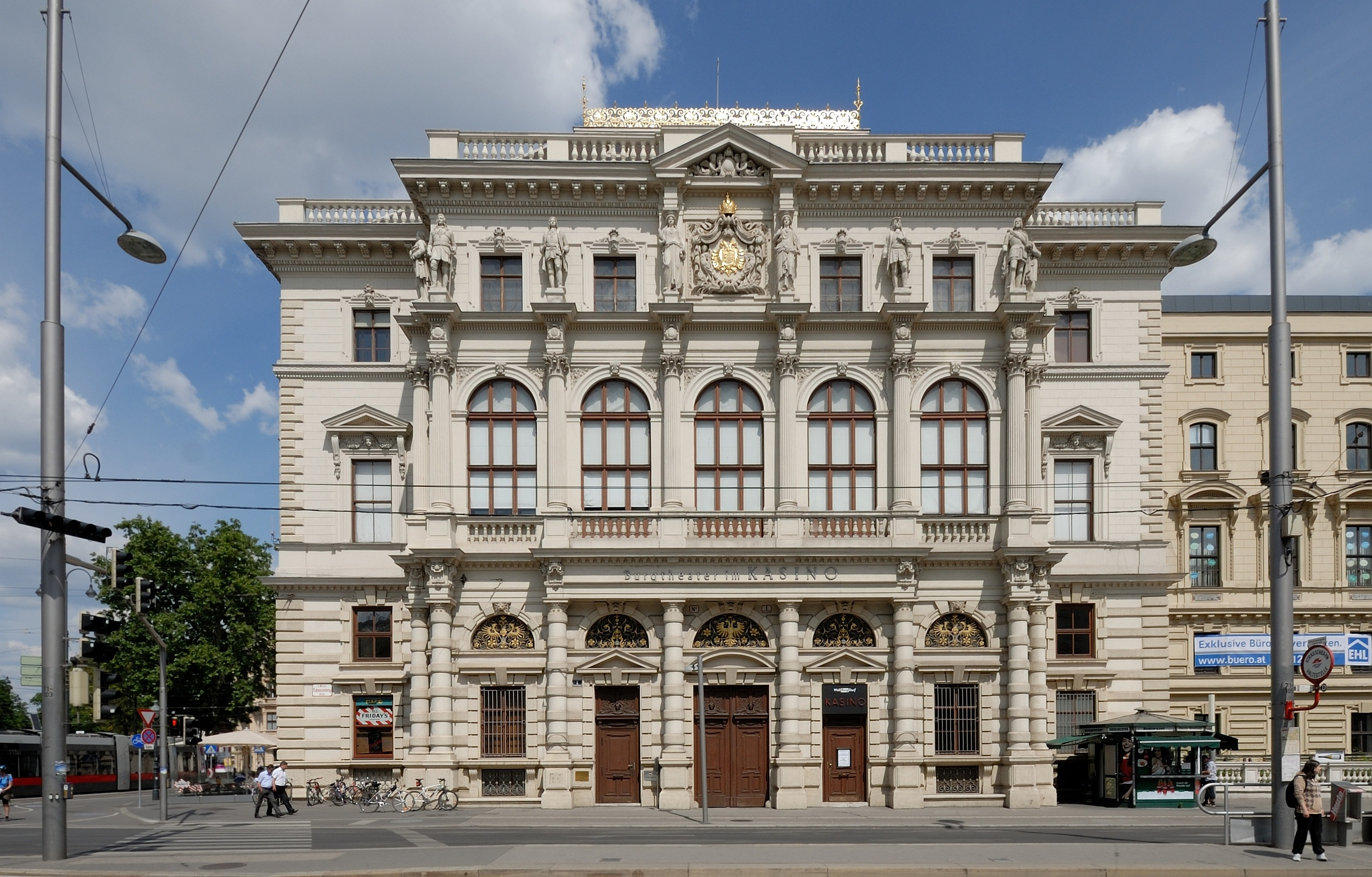 Ehem. Palais Erzherzog Ludwig Viktor, Burgtheater-Casino